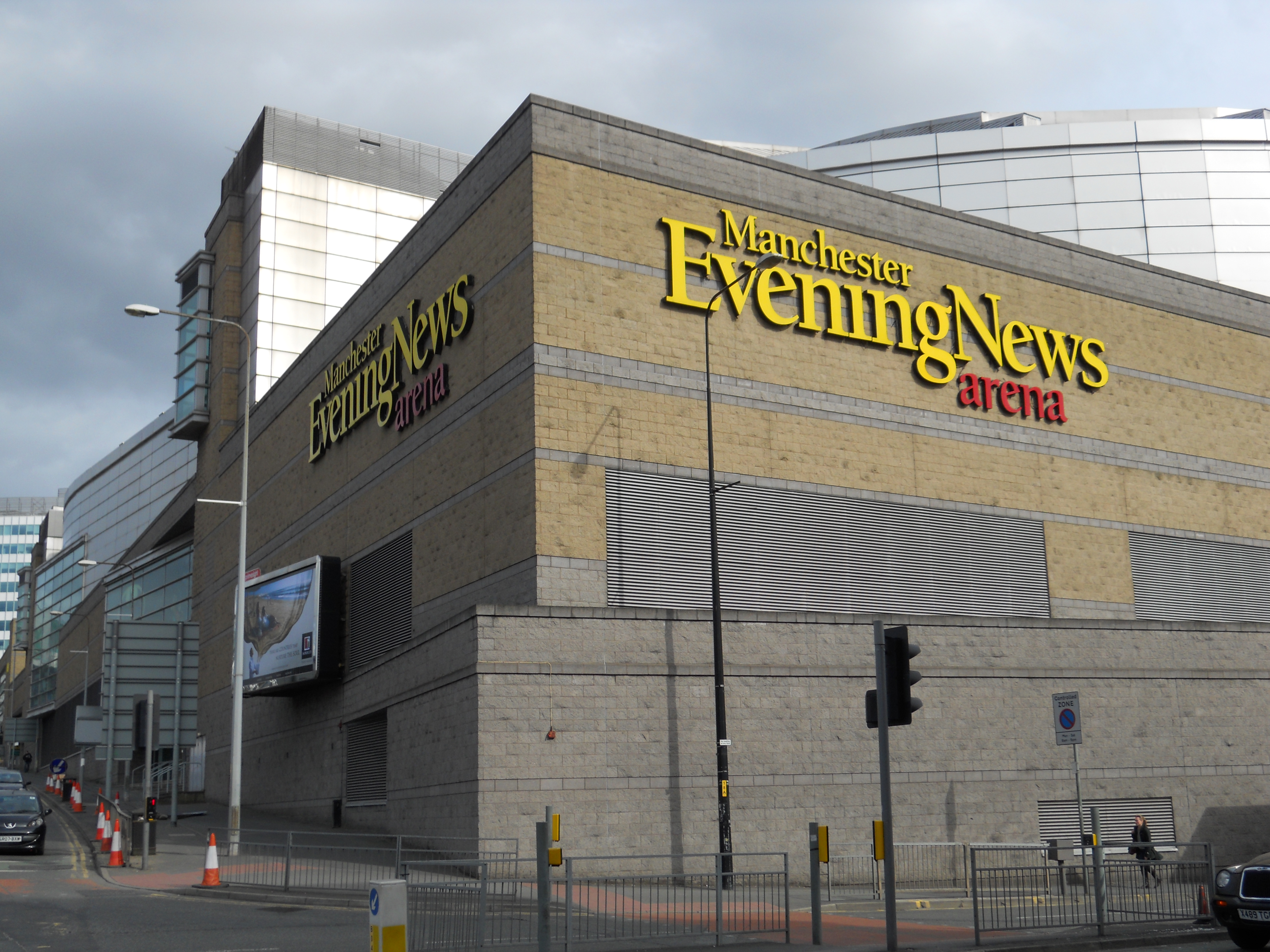 MEN Arena, Manchester